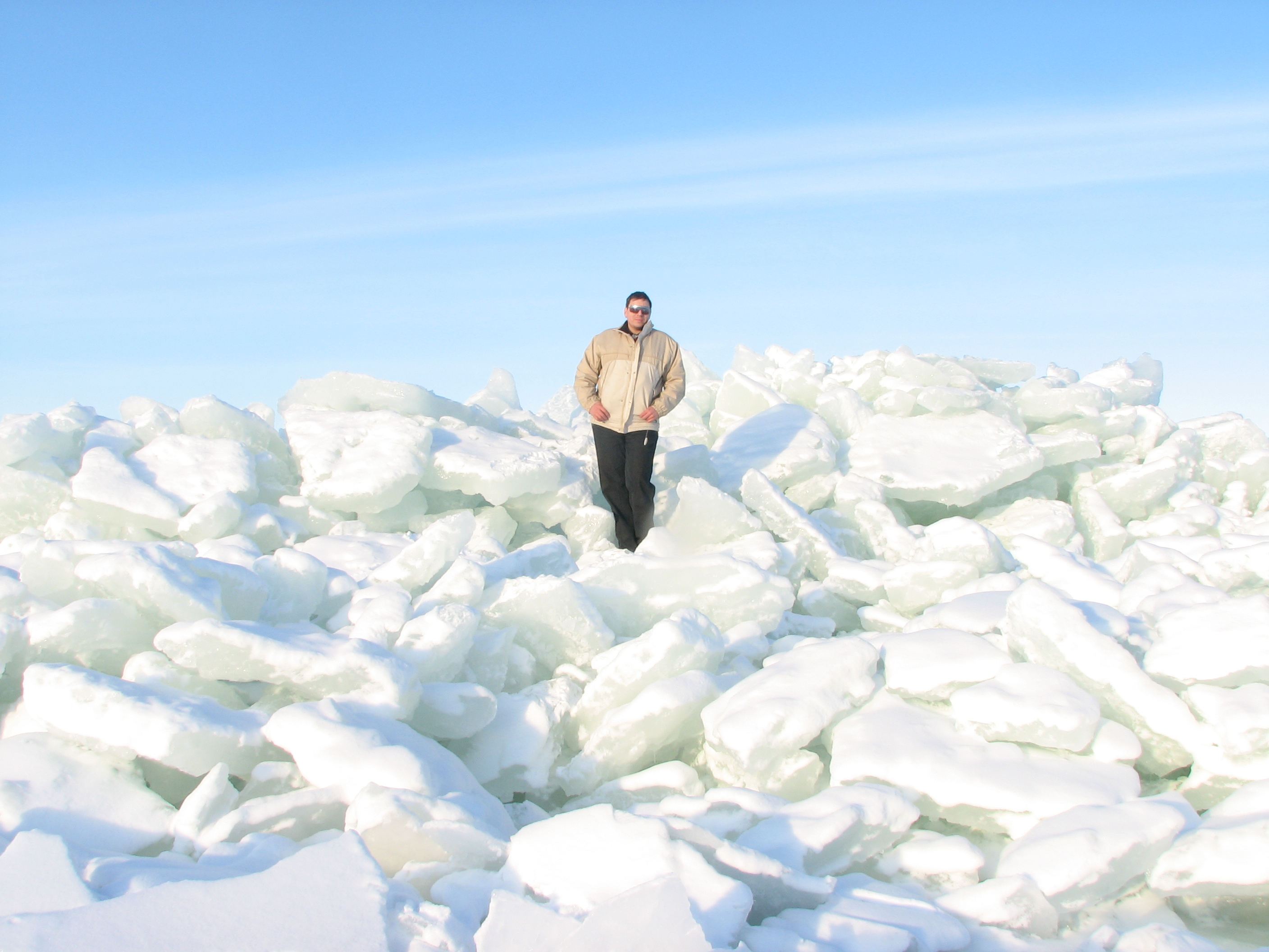 Торосы на Финском заливе